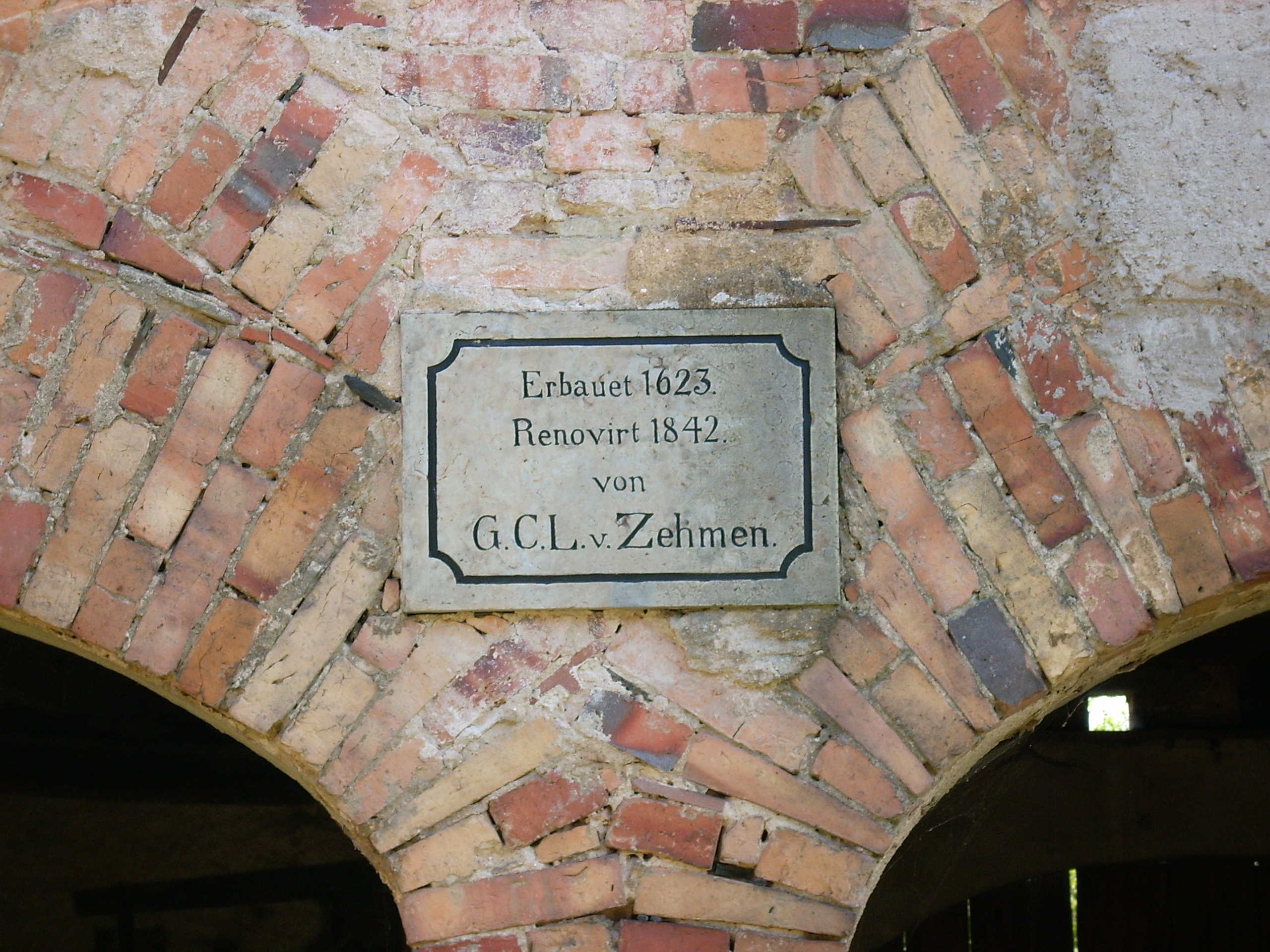 Gedenktafel am Hintergebäude des Schlosses in Weißig, Ortsteil von Oßling Hornjoserbsce: Wopomnjenska tafla při zadnym twarjenju Wysočanskeho hrodu w gmejnje Wóslink